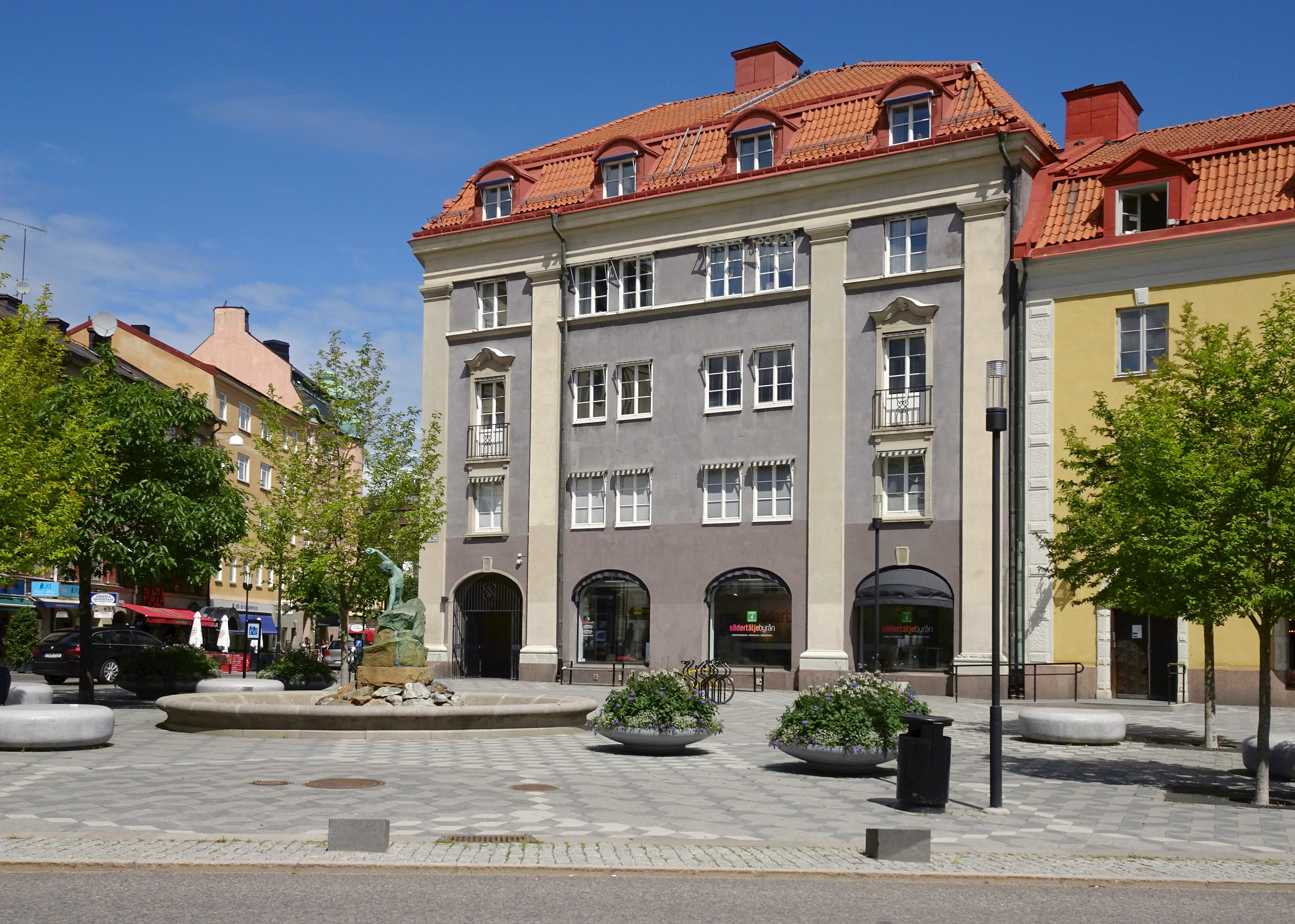 Saltsjötorget, kv Väduren 10 (arkitekt Tore E:son Lindhberg 1922)